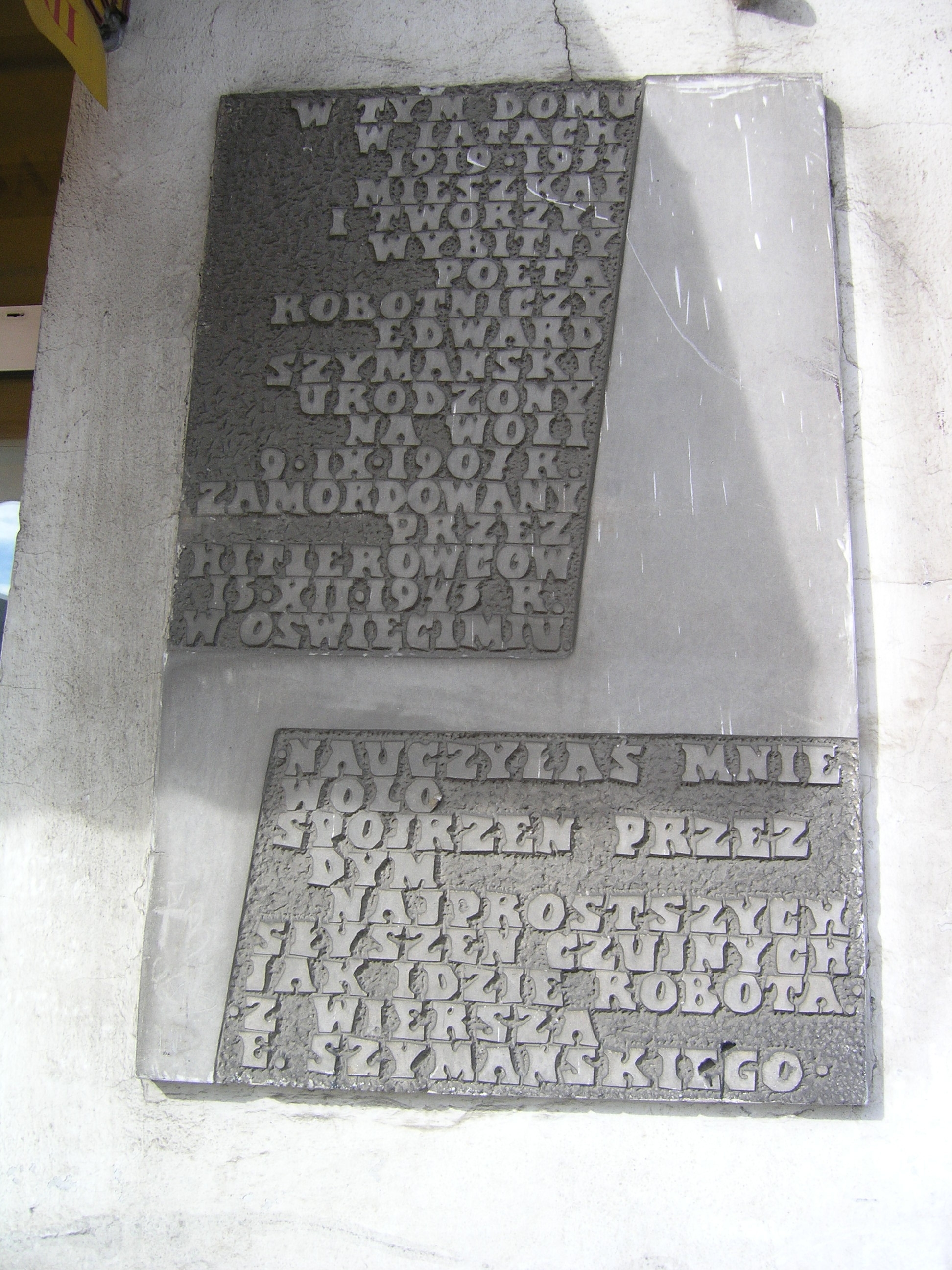 Tablica upamiętniająca poetę Edwarda Szymańskiego na kamienicy w której mieszkał w latach 1919-1934. Adres kamienicy ul. Wolska 54 w Warszawie (stan na marzec 2012)